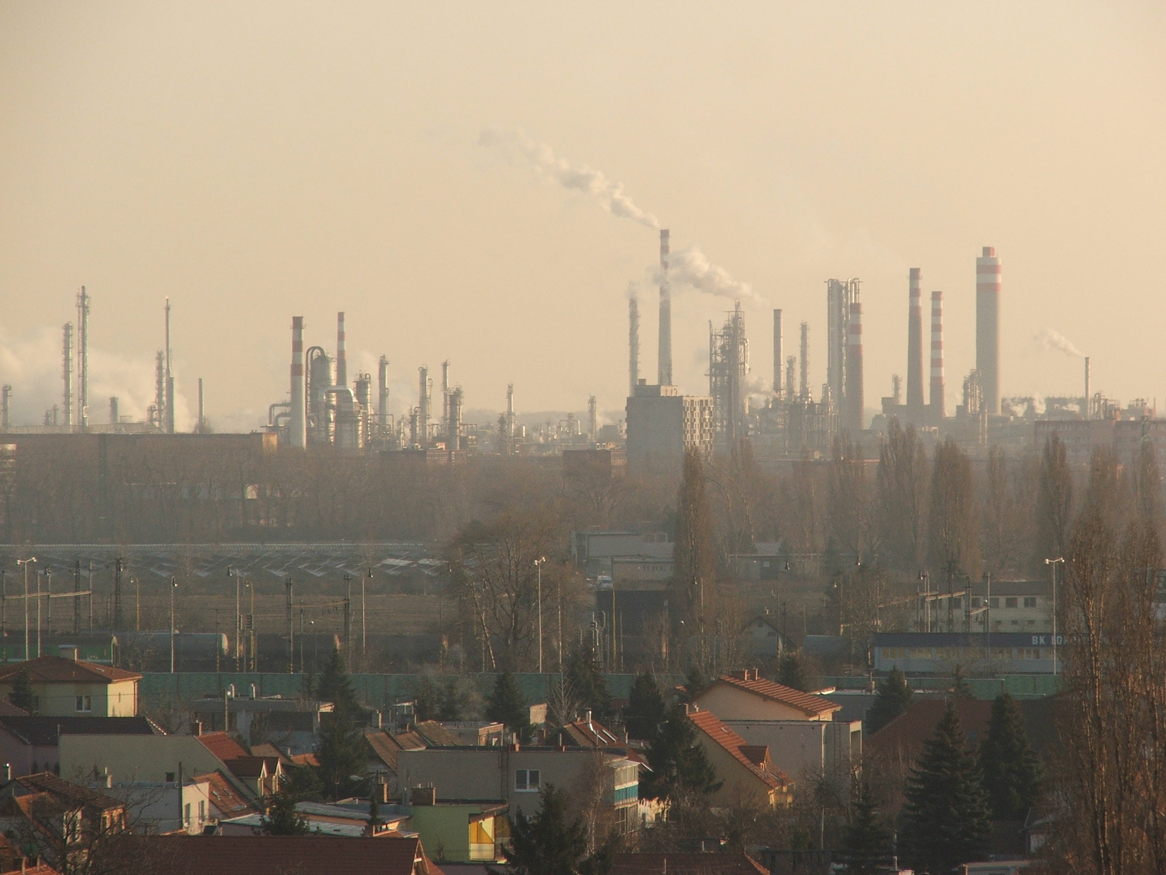 Slovnaft z Mierovej ulice (26.1.2007)